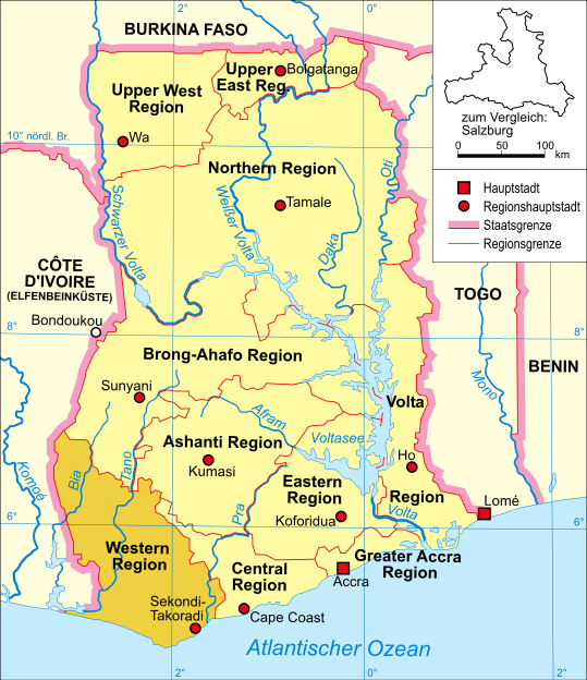 Politische Karte Ghanas (Western Region hervorgehoben) Kategorie:Datei:Ghana